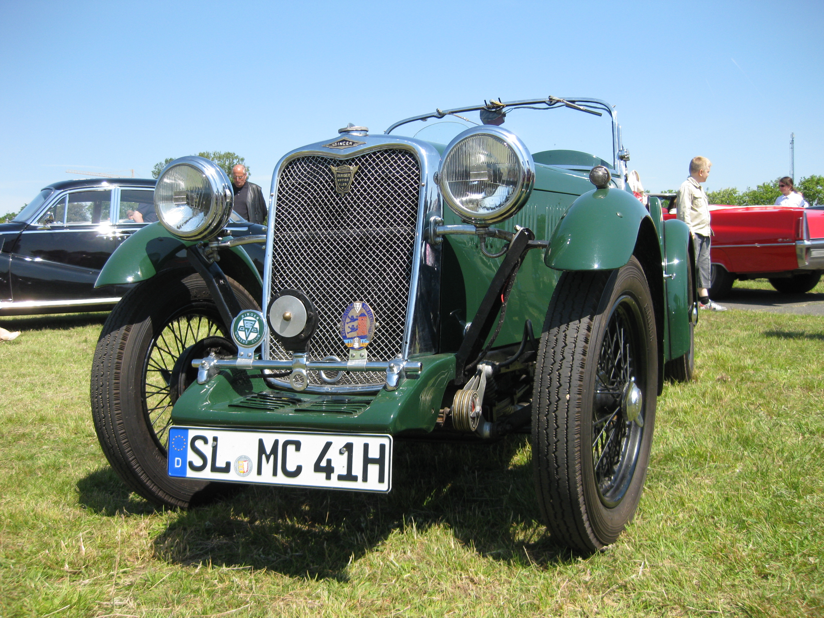 Singer (1941) Frontansicht